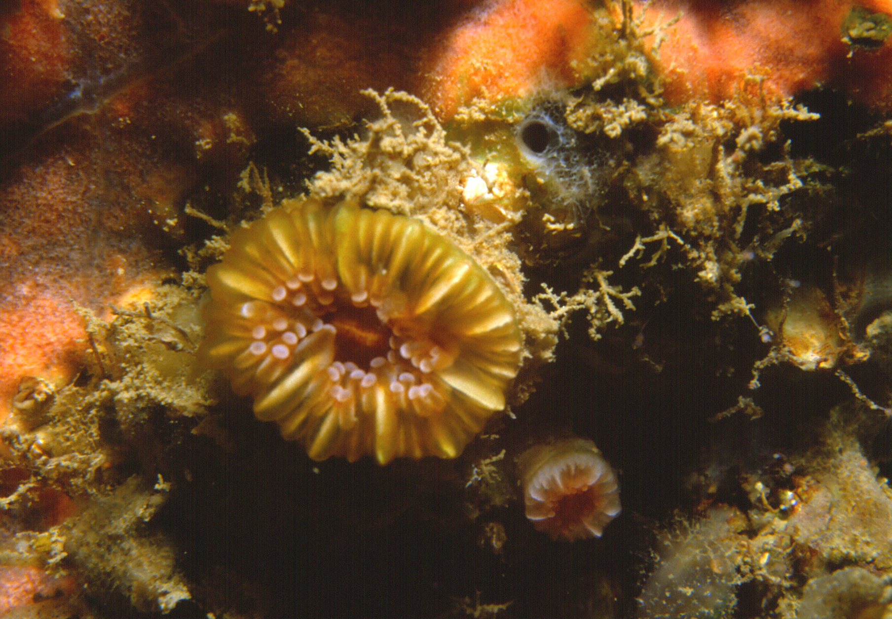 Caryophyllia smithii - Banyuls-sur-Mer, Sec de Rédéris : 08/85